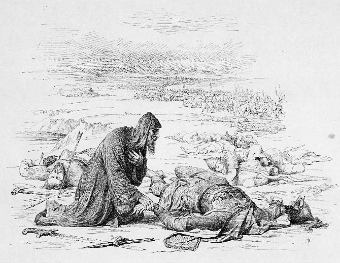 Великий Князь Юрий II Всеволодович. 1219-1238 г.По смерти брата, Константина Всеволодовича, вернул великокняжеский престол. Юрий Всеволодович пал на берегу Сити, при вторичном нашествии Монголов, и найден Епископом Ростовским Кириллом в куче тел обезглавленним.